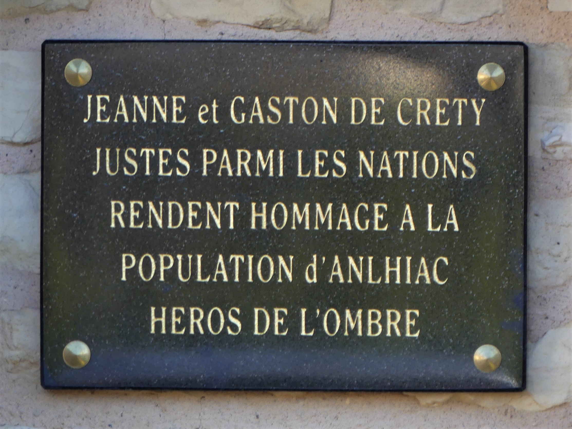 Plaque apposée sur un mur de la mairie, Anlhiac, Dordogne, France.